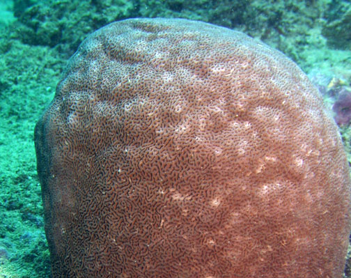 Coscinaraea columna en Samoa Americana